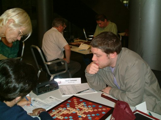 C'est moi A Tours en France, j'ai pas d'autres photos sans copyright désolé.